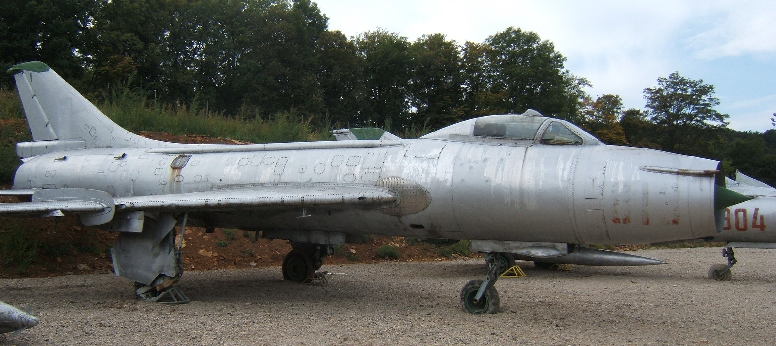 Su-7 BLK conservé au musée du château de Savigny-les-Beaunes